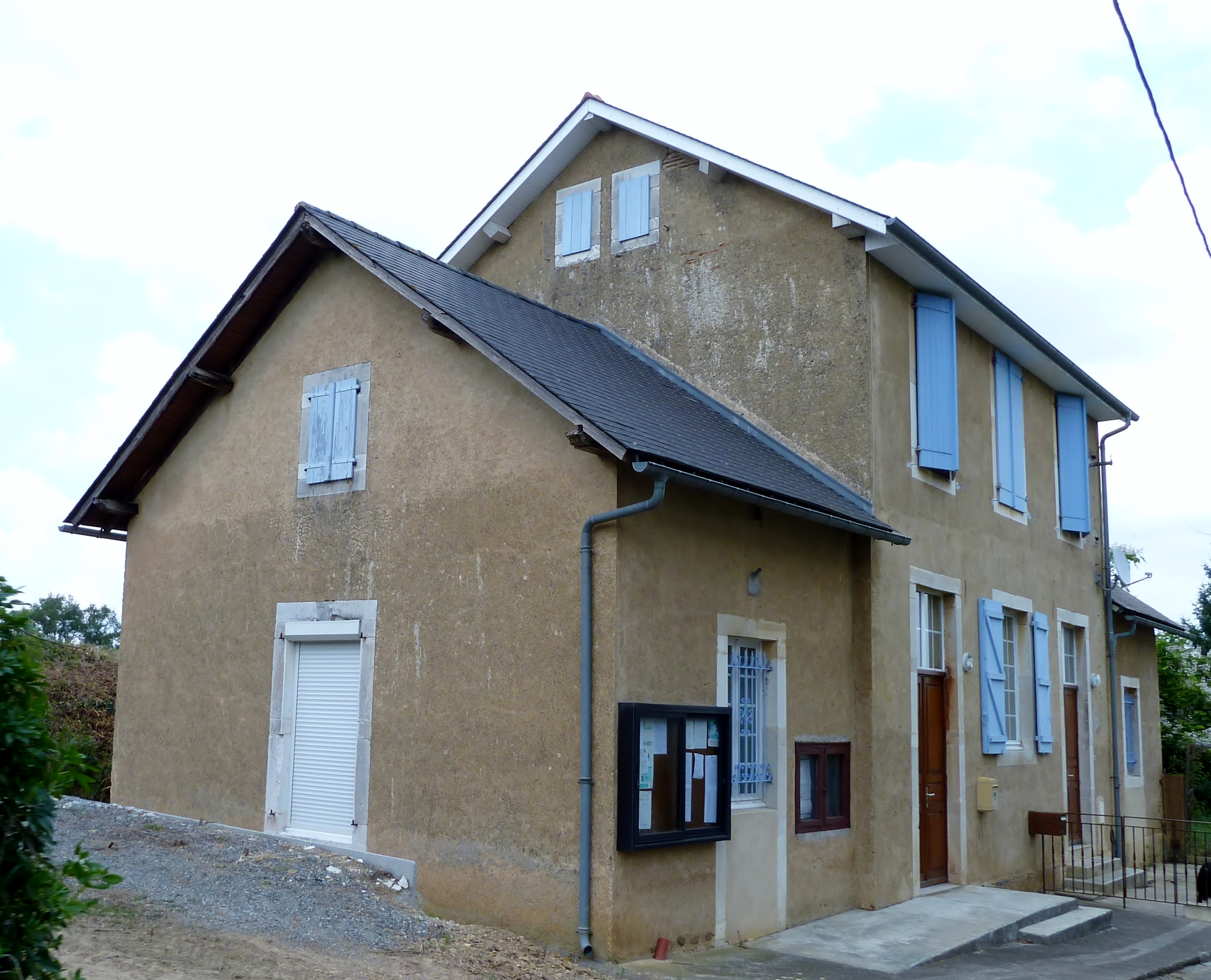 Mairie de Samsons-Lion